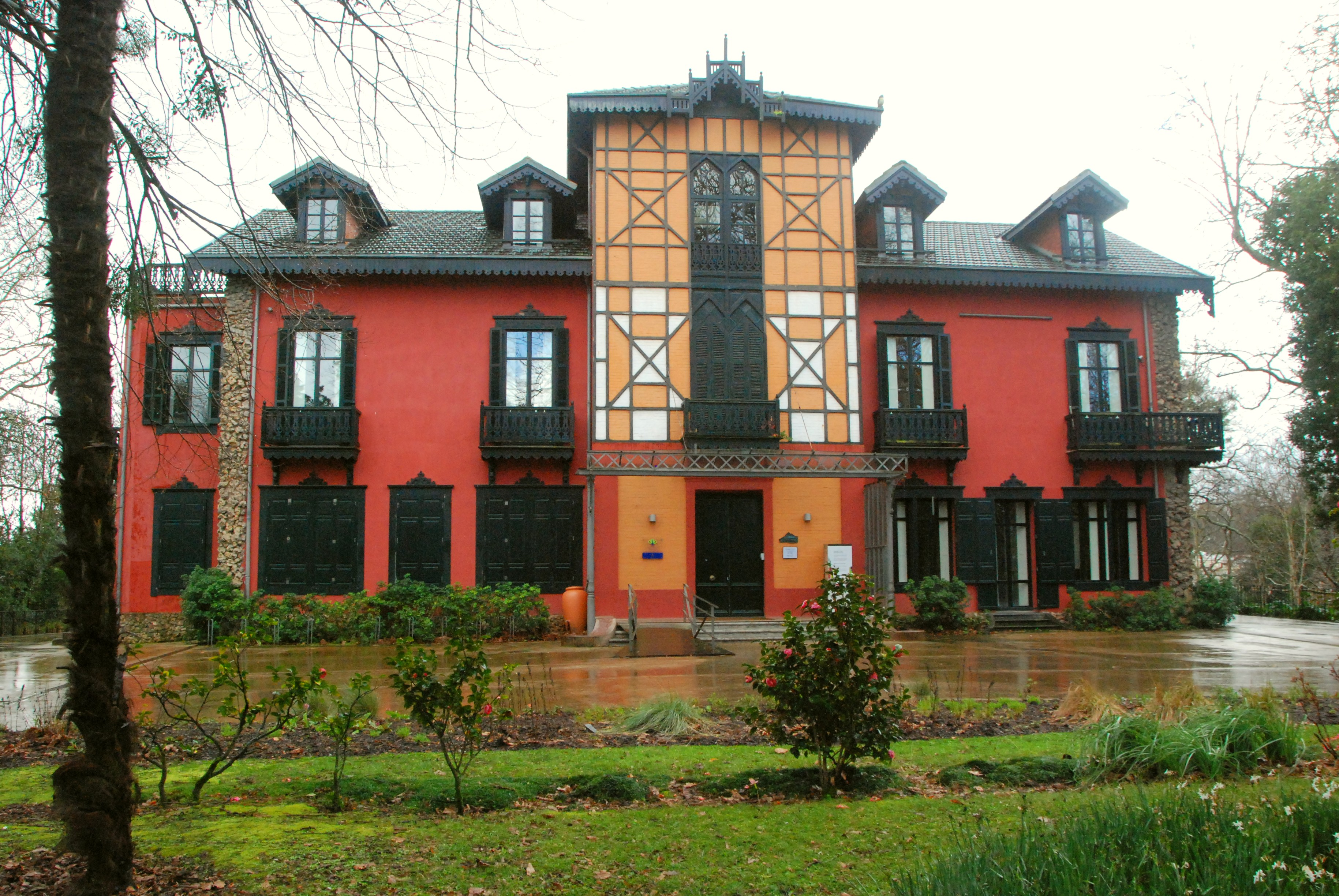 Jauregia Donostiako Cristina enea parkean